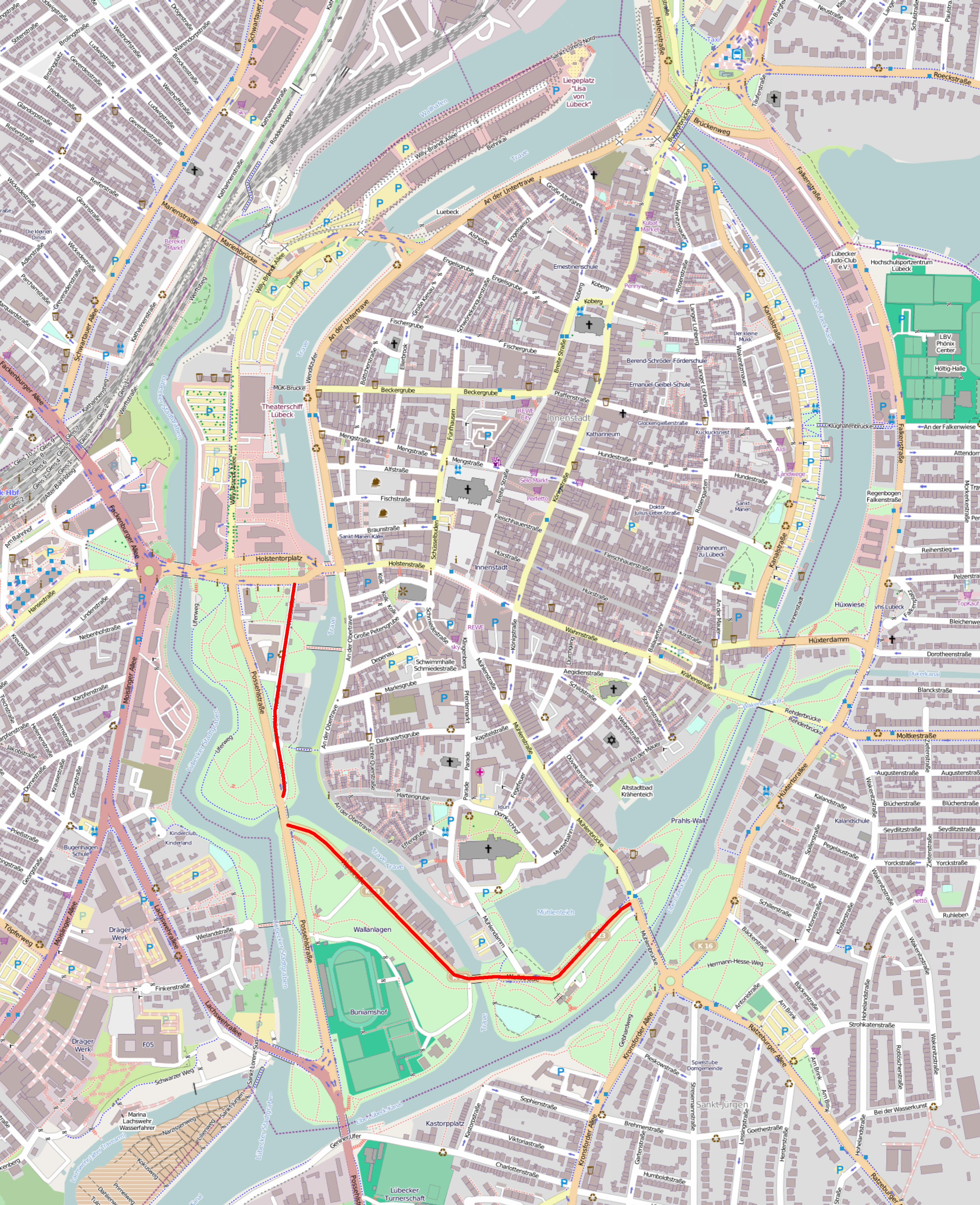 Der Verlauf der Wallstraße in Lübeck, rot markiert auf einer OpenStreetMap-Karte